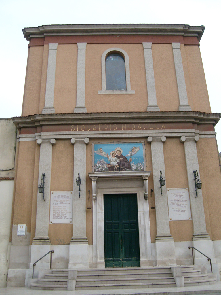 Facciata della Chiesa di Sant'Antonio.